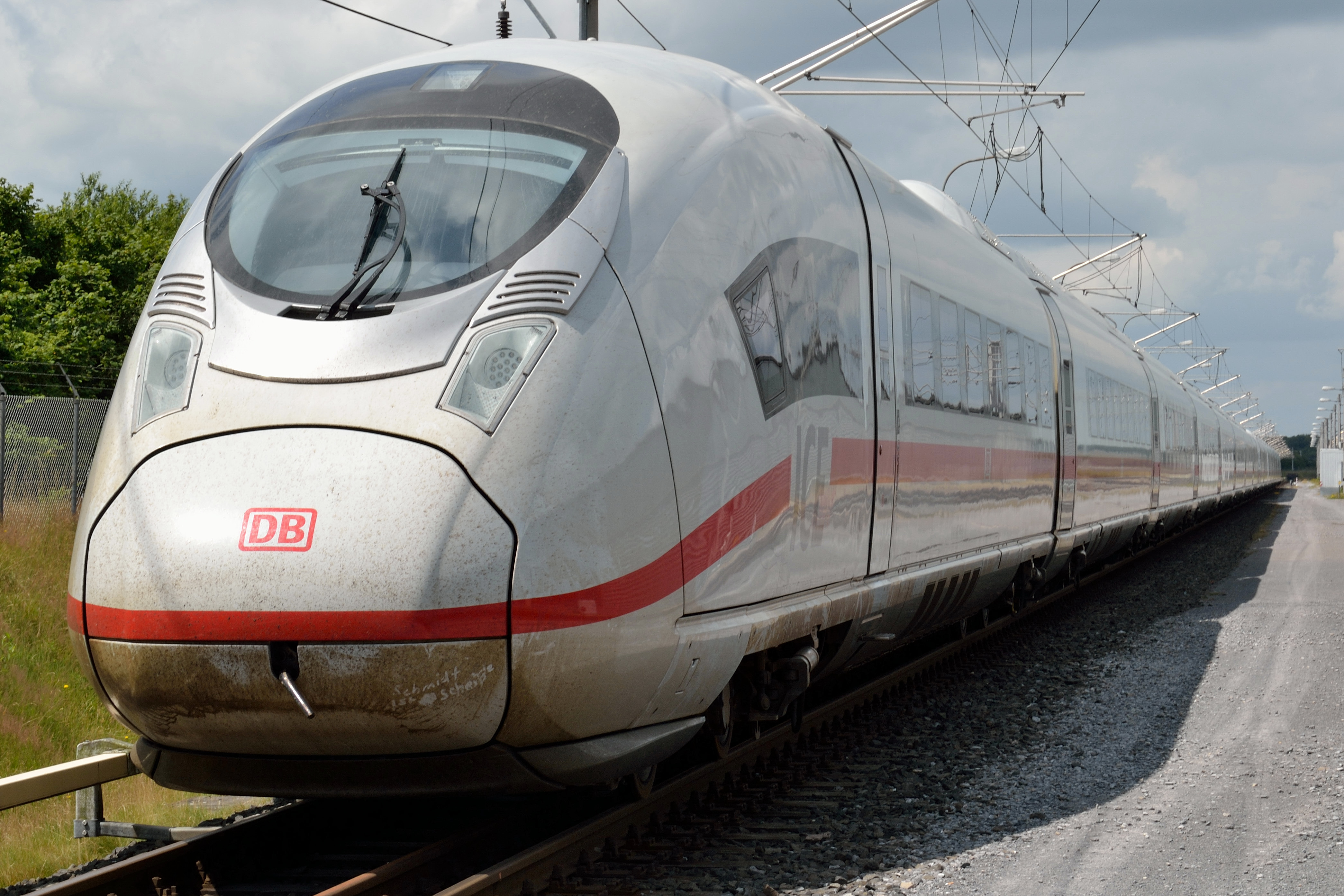 DB-Baureihe 407 im Prüfcenter Wegberg-Wildenrath beim Tag der offenen Tür